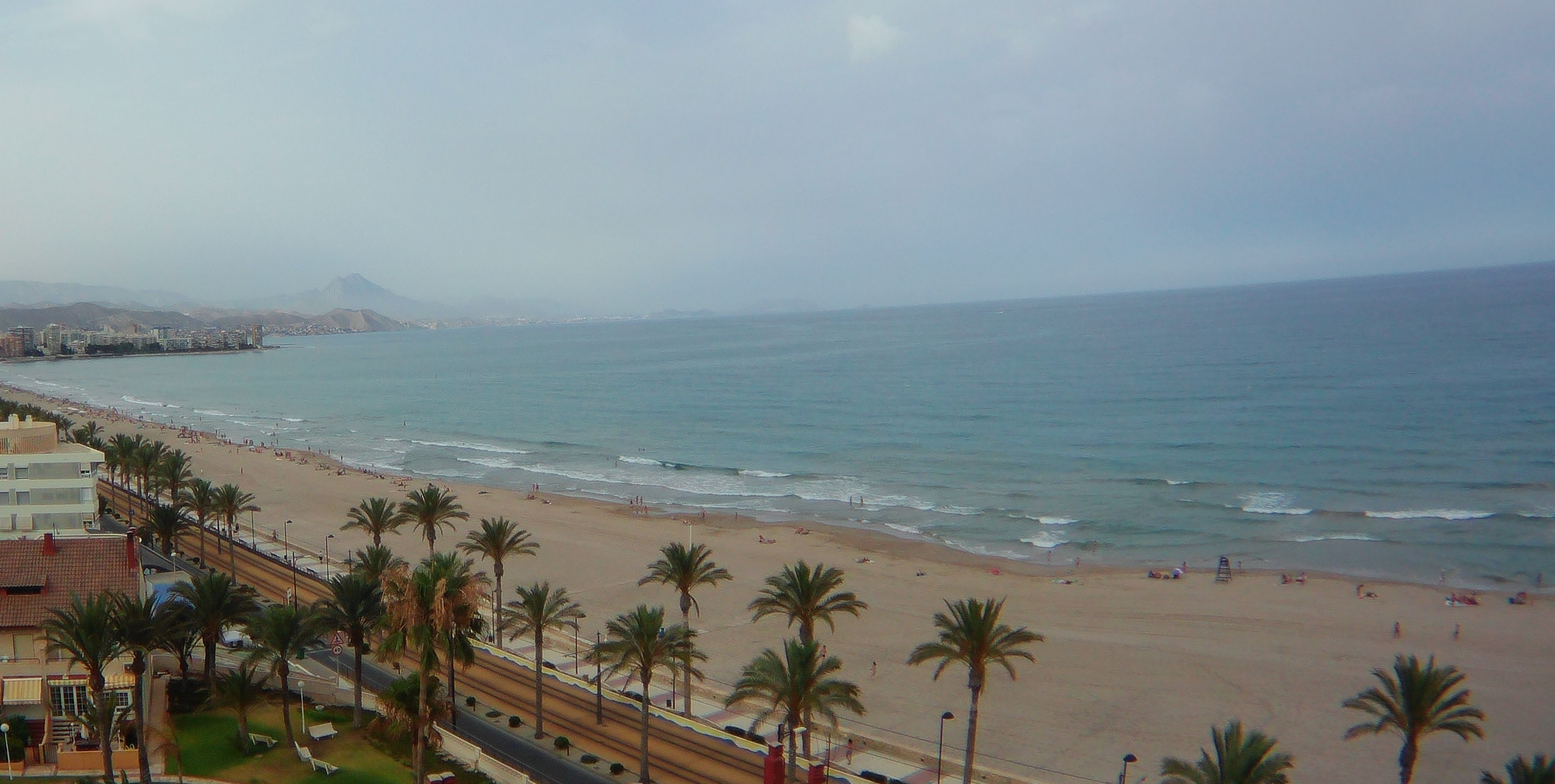 Playa muchavista (El Campello) foto tomada desde edificio cercano a la playa en verano de 2016.